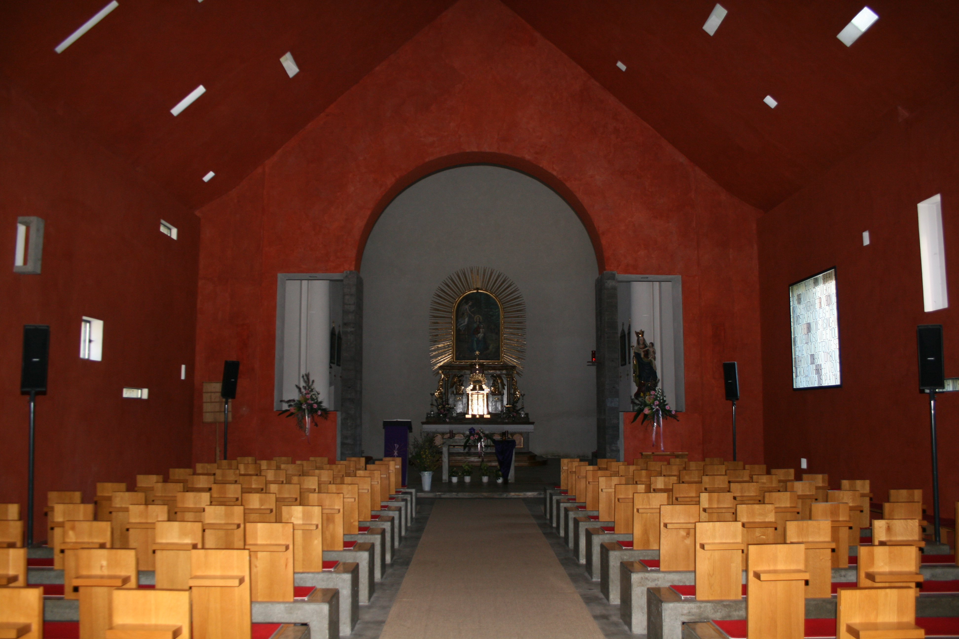 Autobahnkirche Dolina, Maria-im-Walde-Kirche Innenansicht